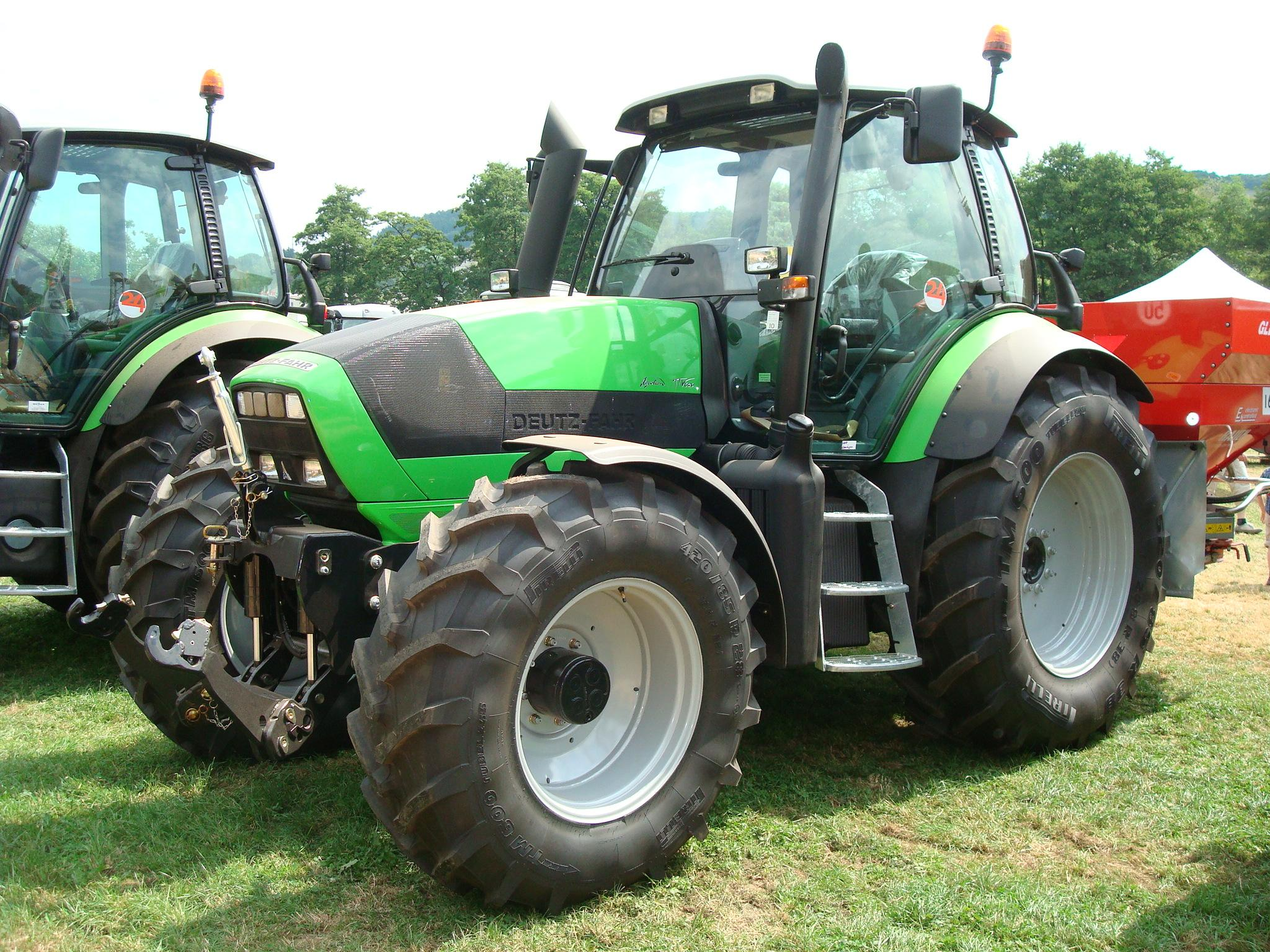 Deutz-Fahr Agrotron TTV620